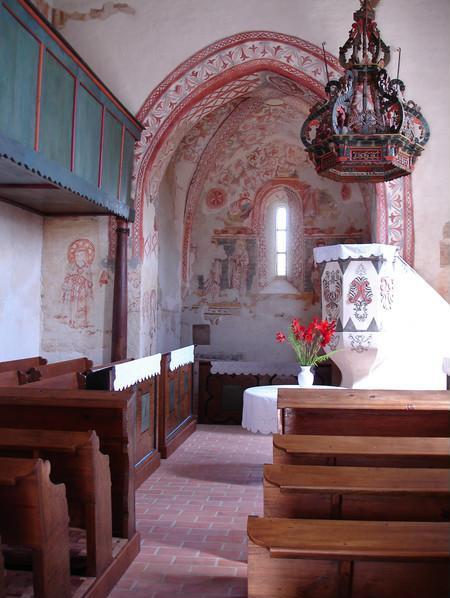 Templombelső Nagylónyán